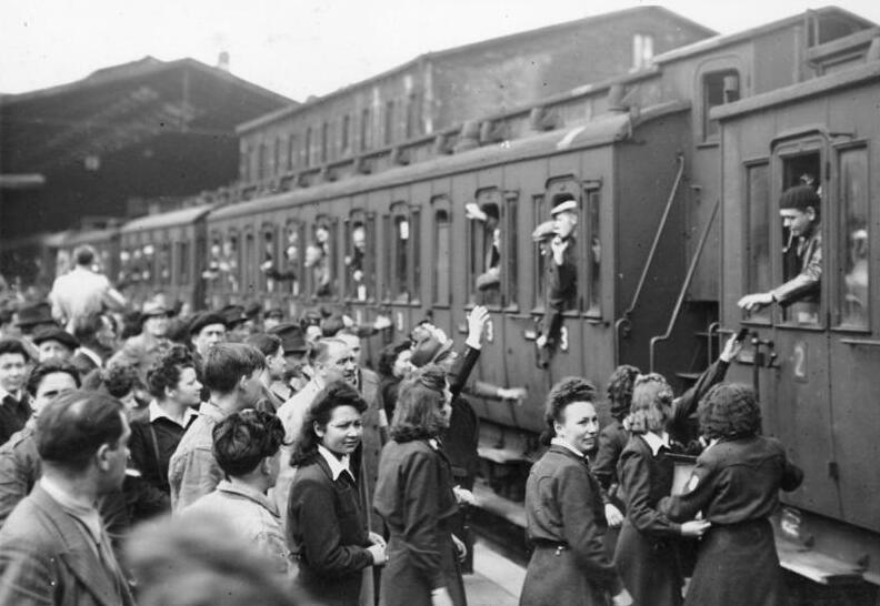 Paris, Abreise französischer Kriegsarbeiter nach Deutschland Dieser Tage verließen die ersten tausend ehemaligen französischen Kriegsgefangenen Paris, um nach Deutschland zurückzukehren und dort als freie Arbeiter tätig zu sein. Unser Bild zeigt die Abfahrt des Sonderzuges auf dem Nordbahnhof in Paris. Scherl Bilderdienst, Berlin 3.6.1943 [Herausgabedatum Information added by Wikimedia users.